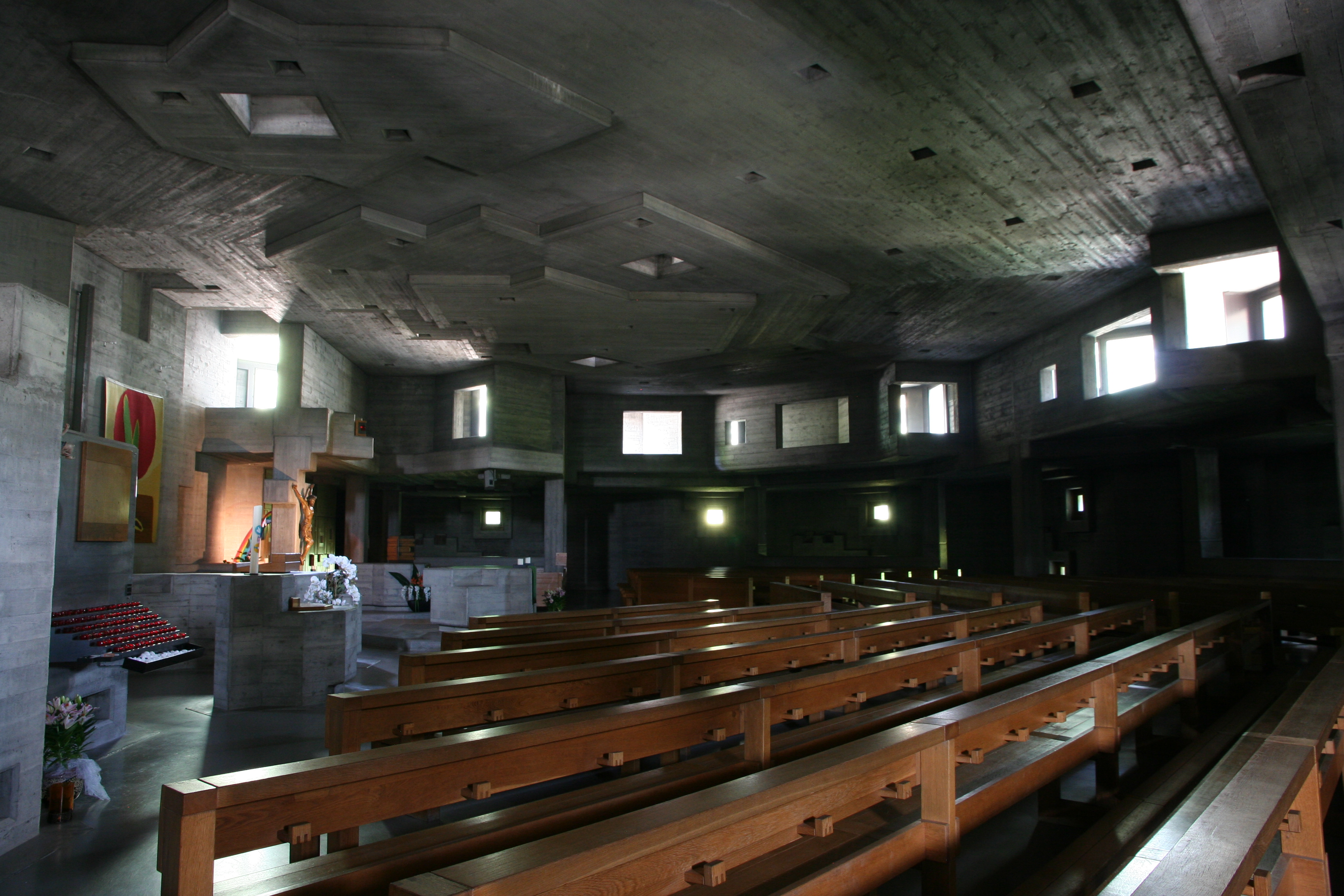 Römisch-katholische Pfarrkirche Heiligkreuz Bern